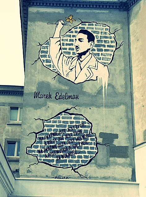 MuraL Marka Edelmana w Warszawie